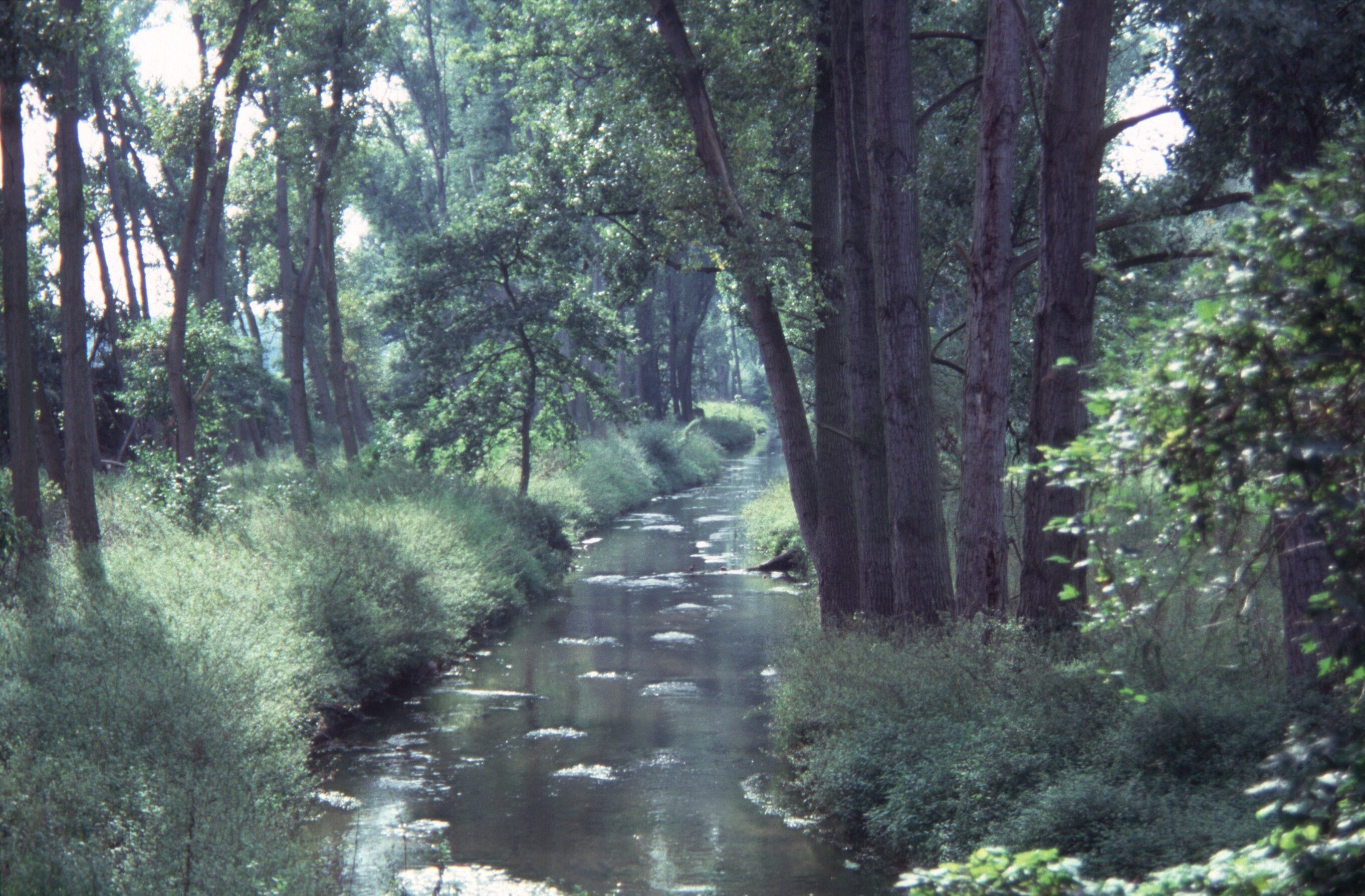 Unterlauf des Rehbaches zwischen Neuhofen und Ludwigshafen-Rheingönheim (nach der Waldmühle flußabwärts).